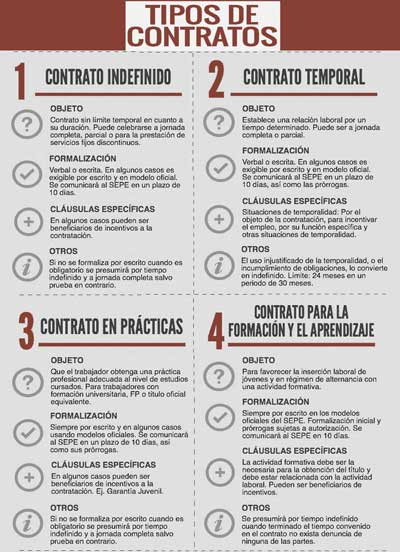 Tipos de contrato de trabajo